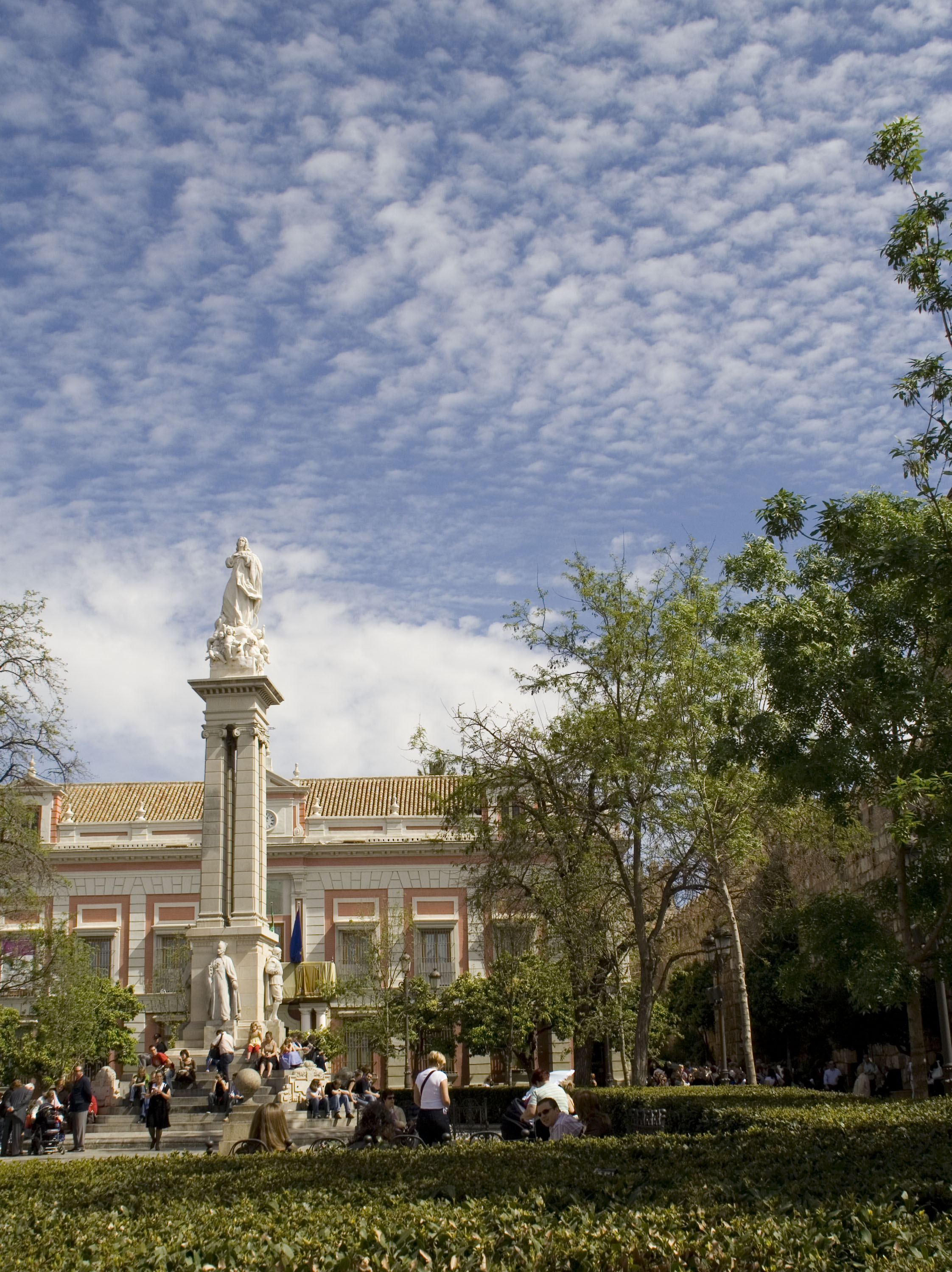 Plaza del Triunfo. Barrio de Santa Cruz. Sevilla.